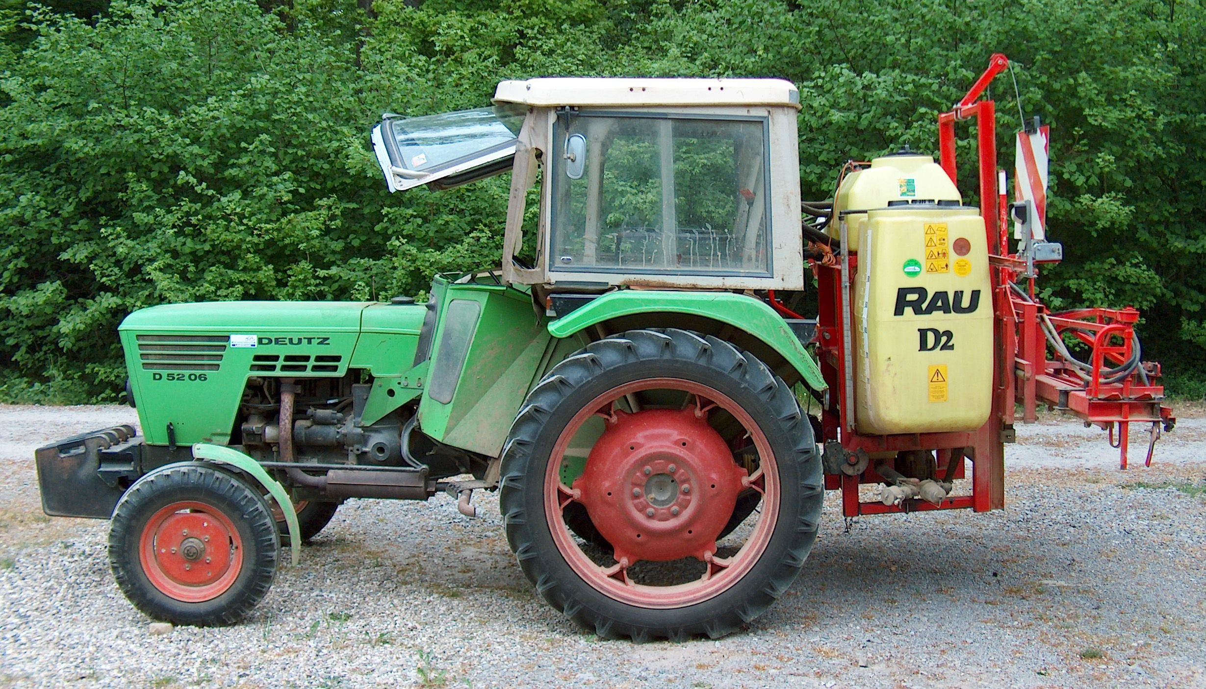 Feldspritze Rau D2 an einem Deutz D 52 06